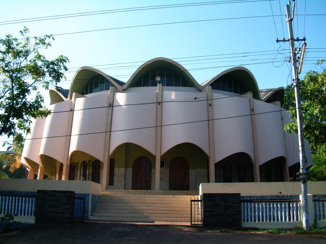 Christ college, Chalel